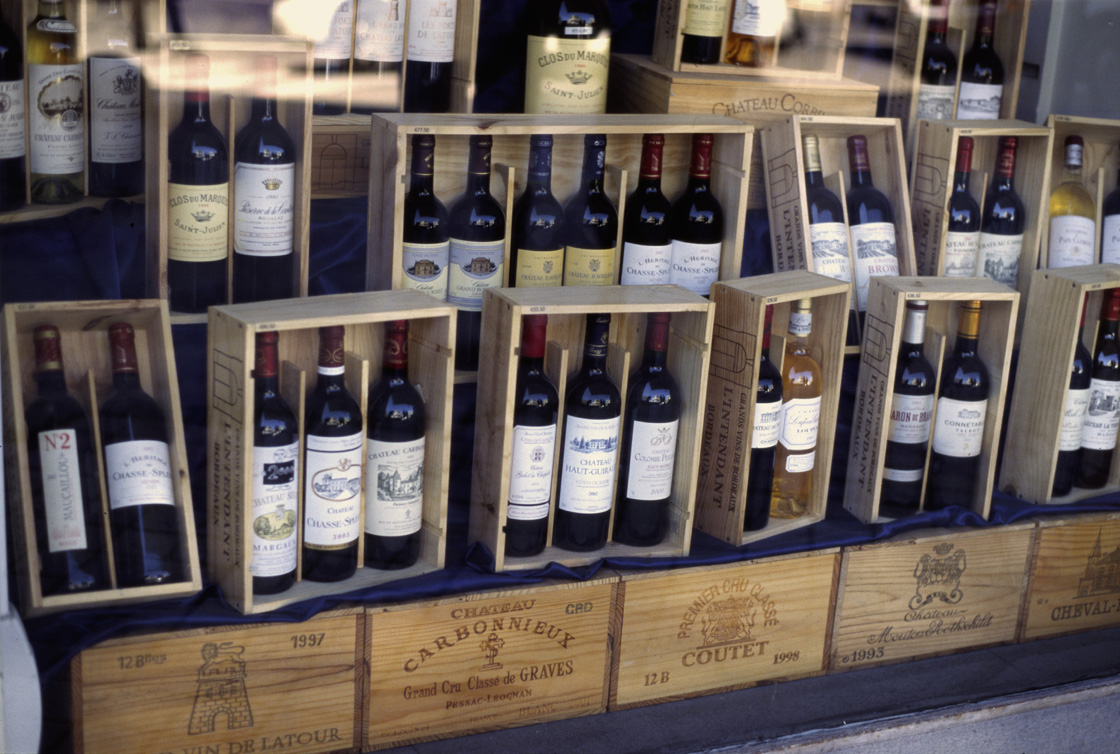 Bottles of Bordeaux Wine in Shop, Bordeaux, France